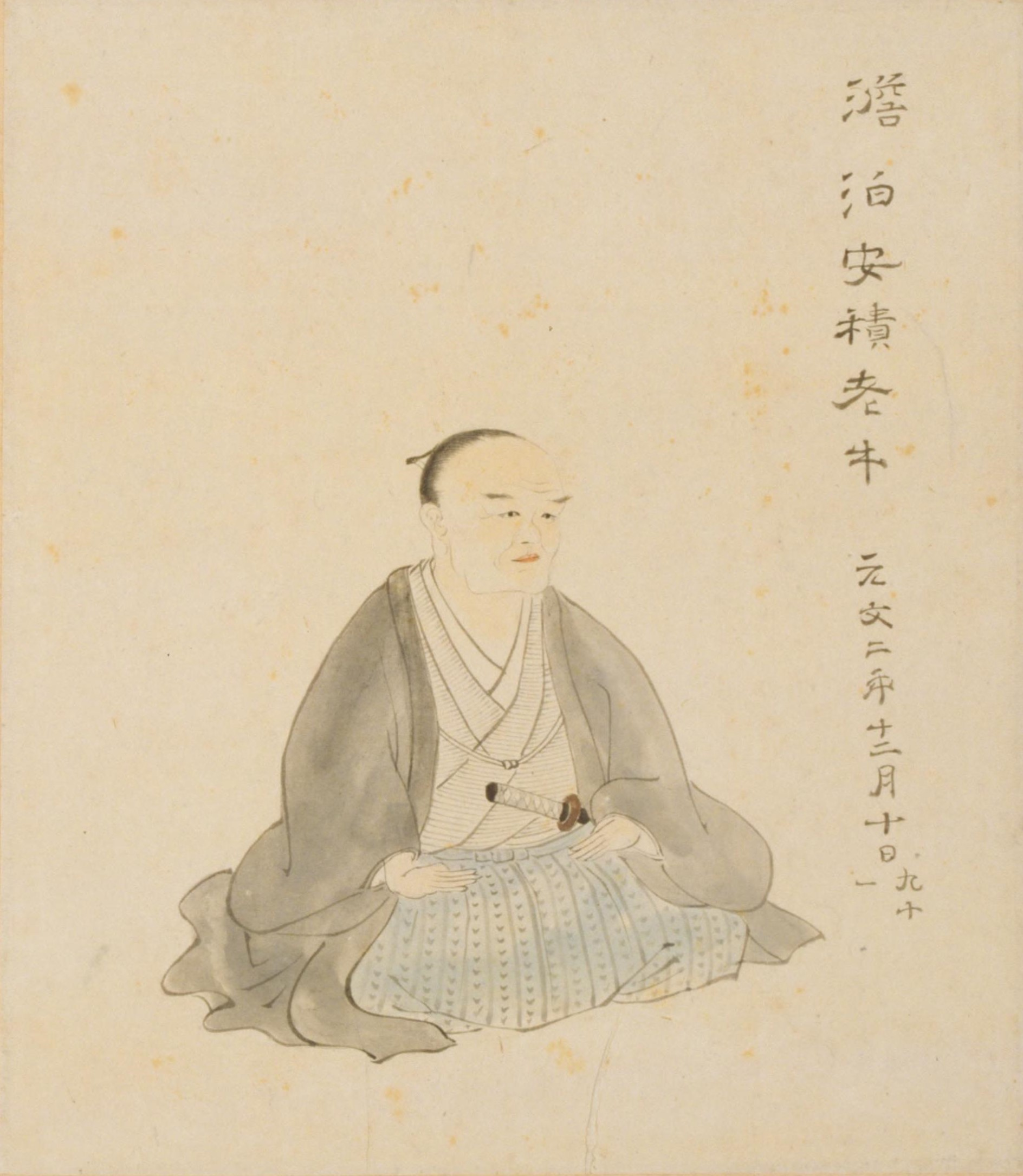 安積澹泊老牛 元文二年十二月十日 九十一